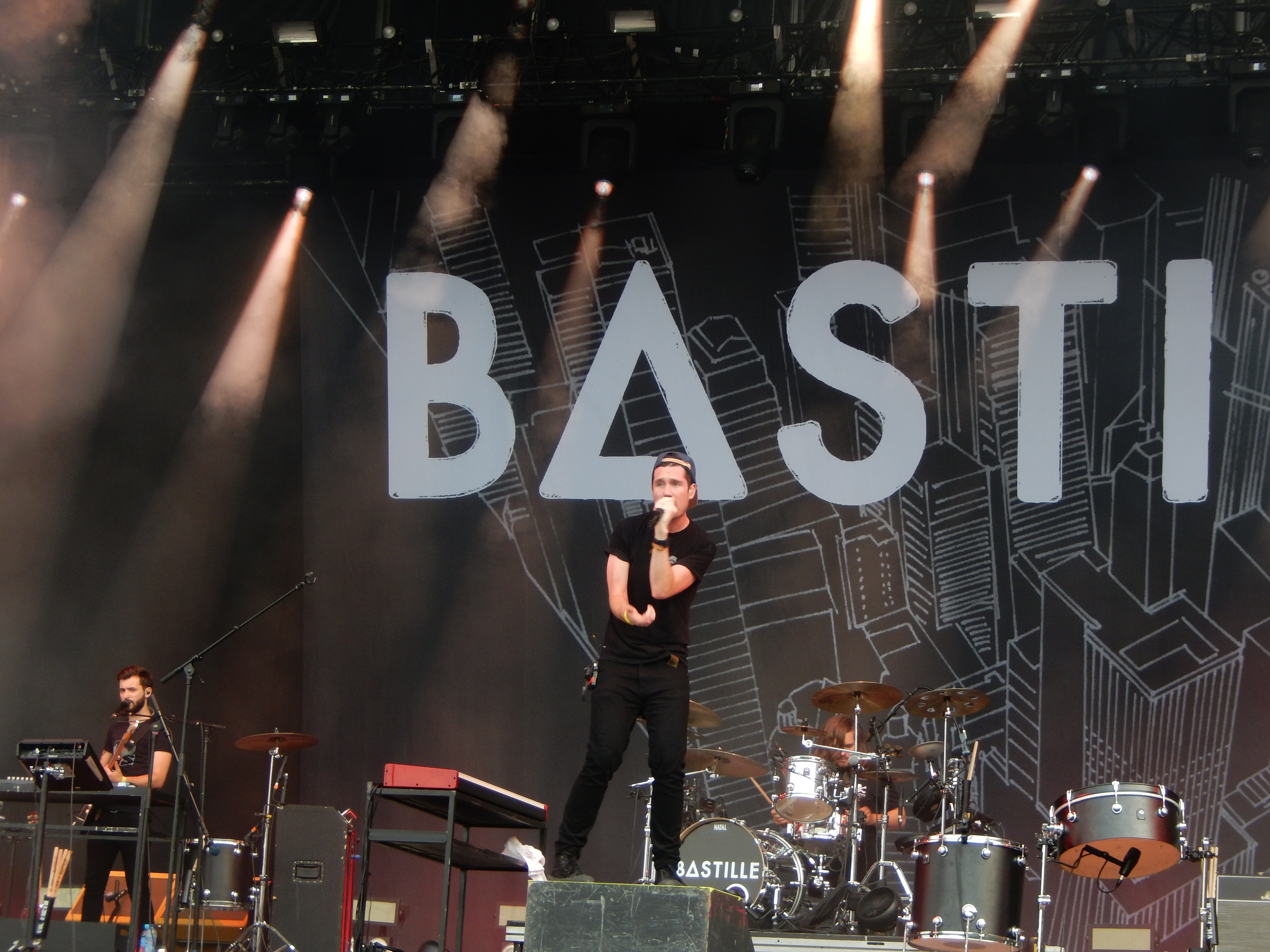 Bastille, Rock en Seine 2016, Paris